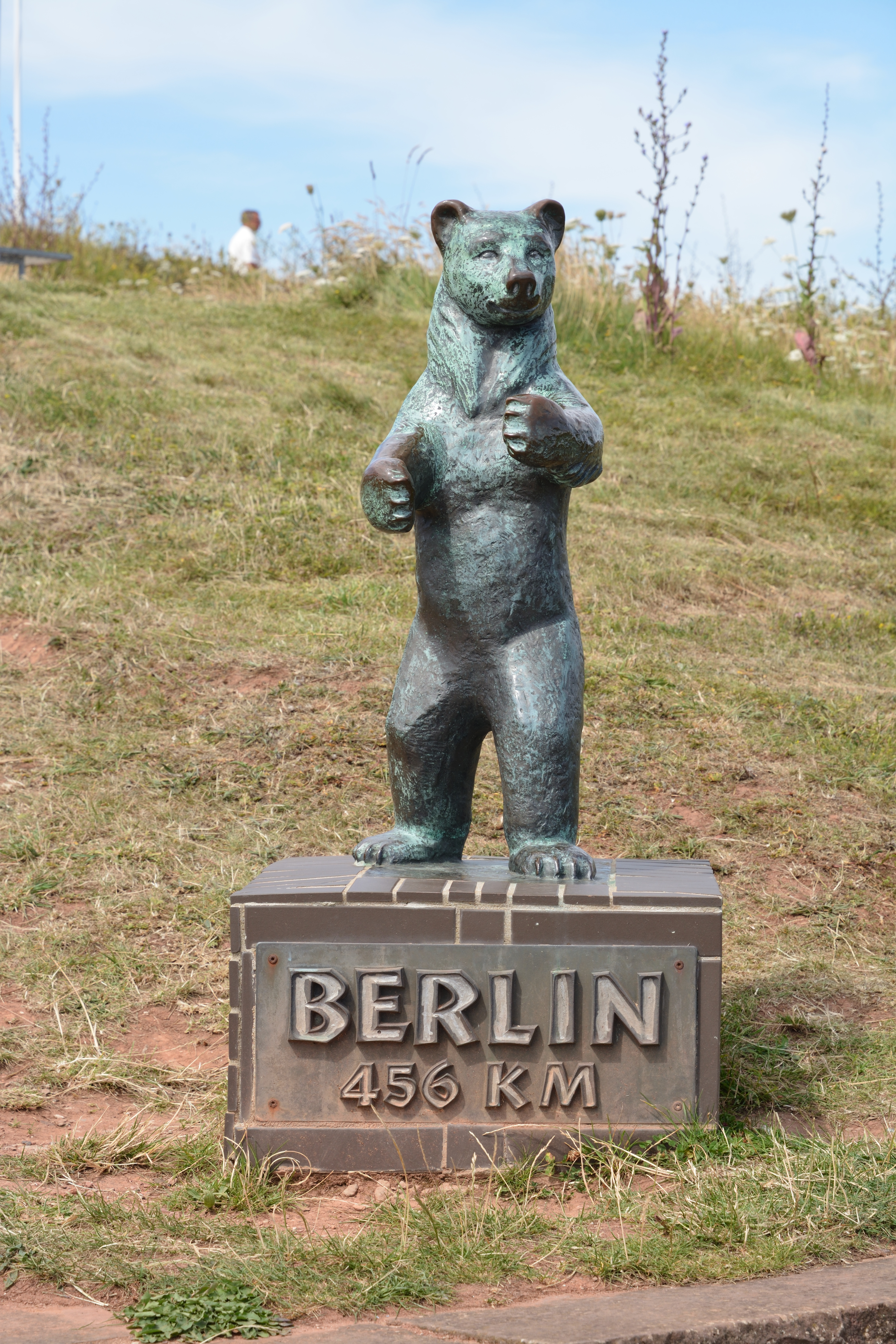 Bilder von Helgoland im Juli 2019Berliner Bär auf dem Oberland von Helgoland